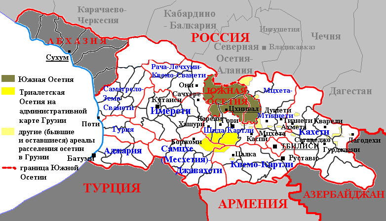 Триалетская Осетия на карте Грузии